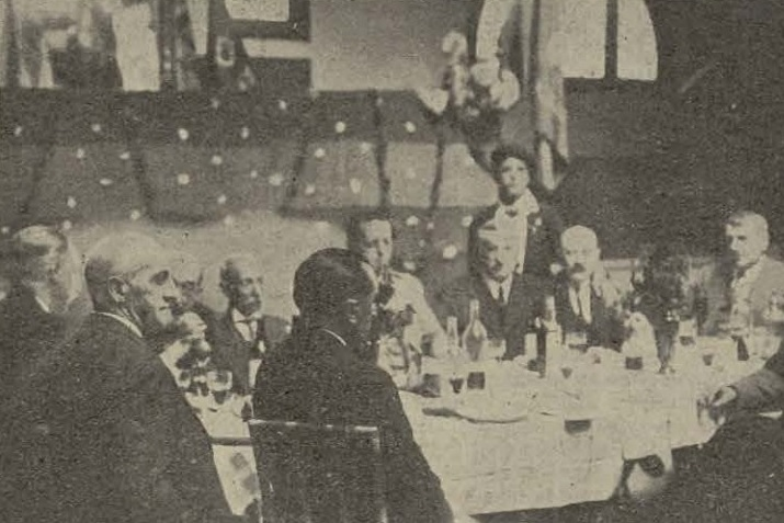 1930, bankett Azcoitias